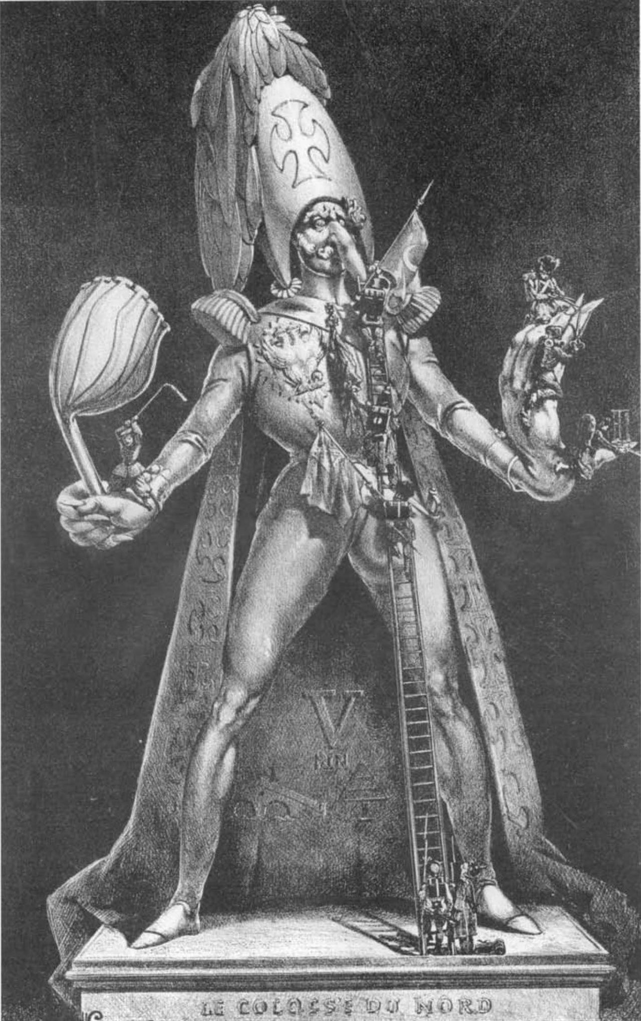 Северный колос. Французская карикатура на Николая I и Крымскую войну.